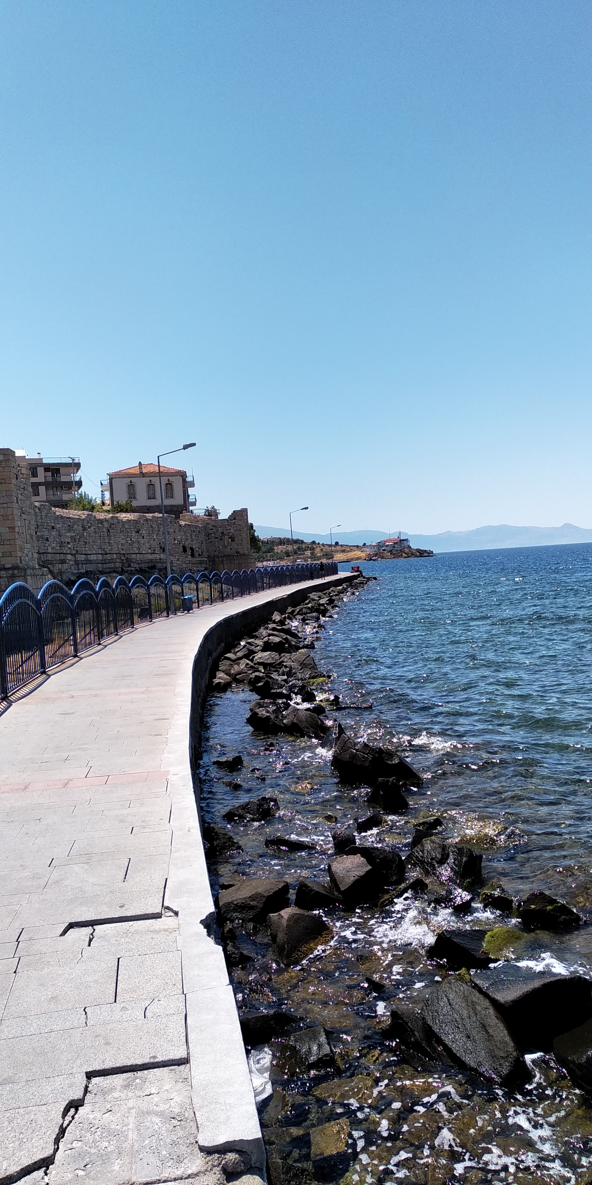 Foça Kalesi. Deniz tarafından kaldırım.